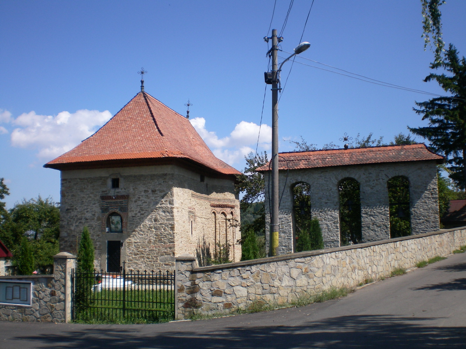 Biserica Sfanta Treime din Siret, prima biserica de plan triconc din Moldova.